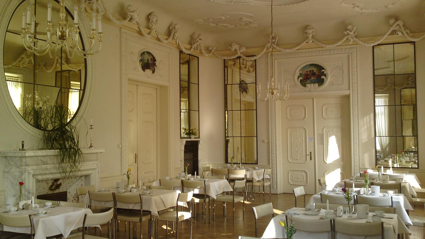 Spiegelsaal Schloss Craheim